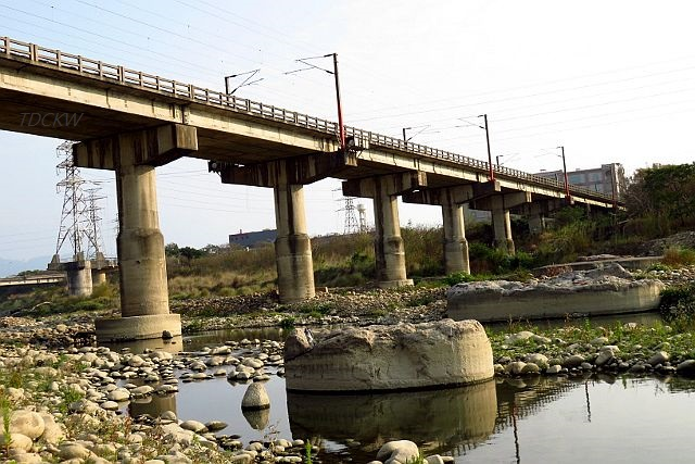 台鐵山線後龍溪橋 was filmed by TDCKW on 20150219